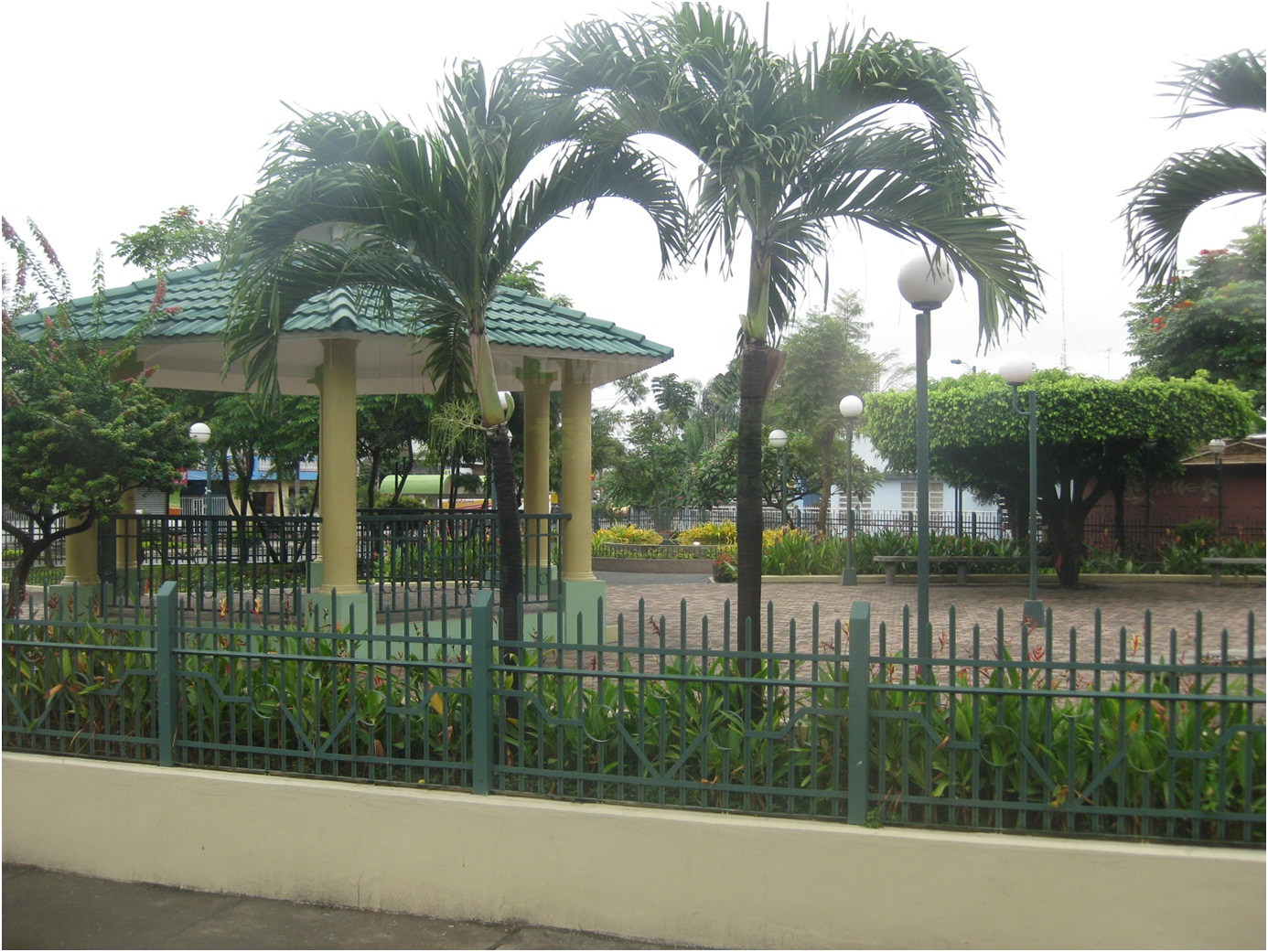 Milagroko enparantza. 2011.